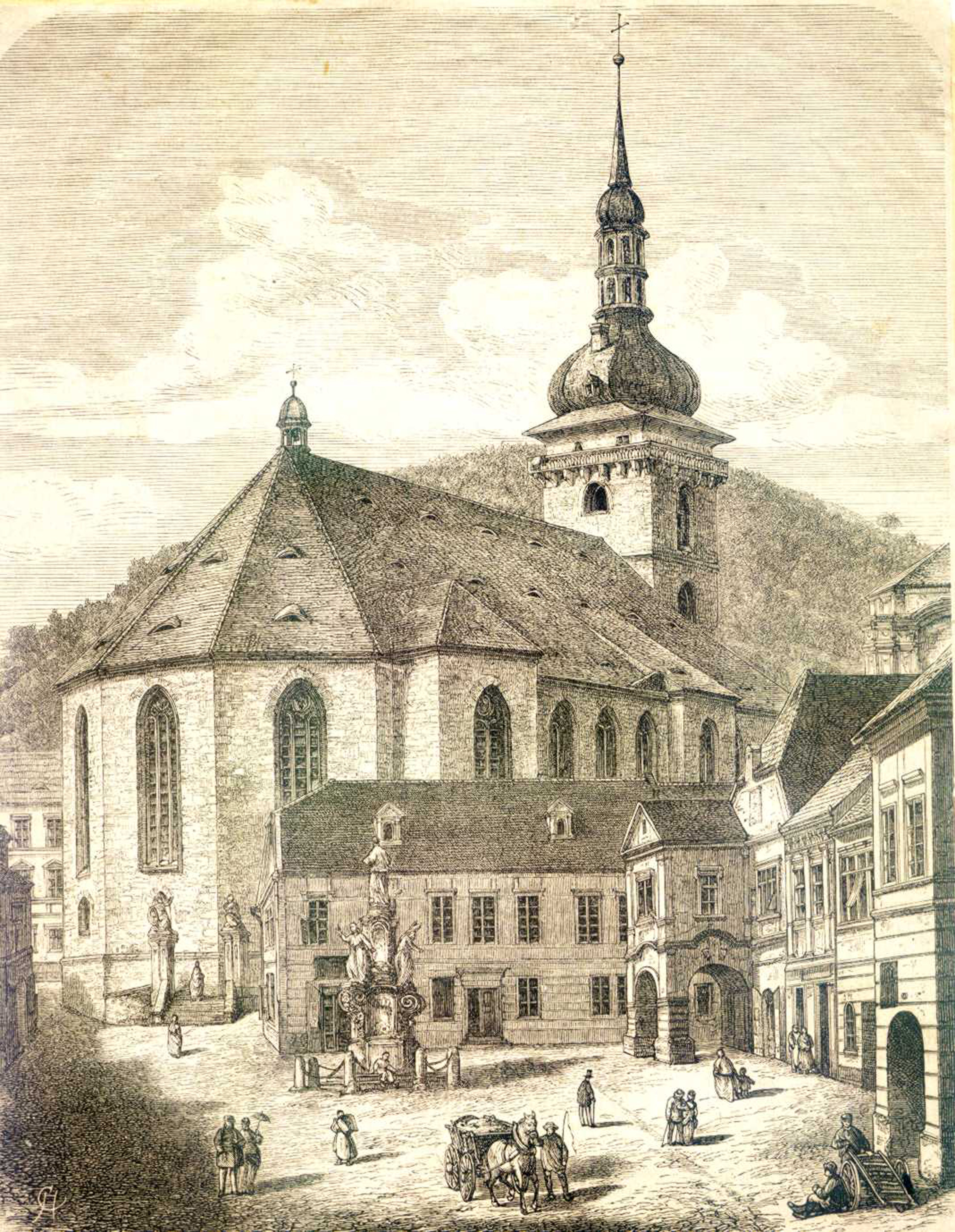 Most - děkanský kostel